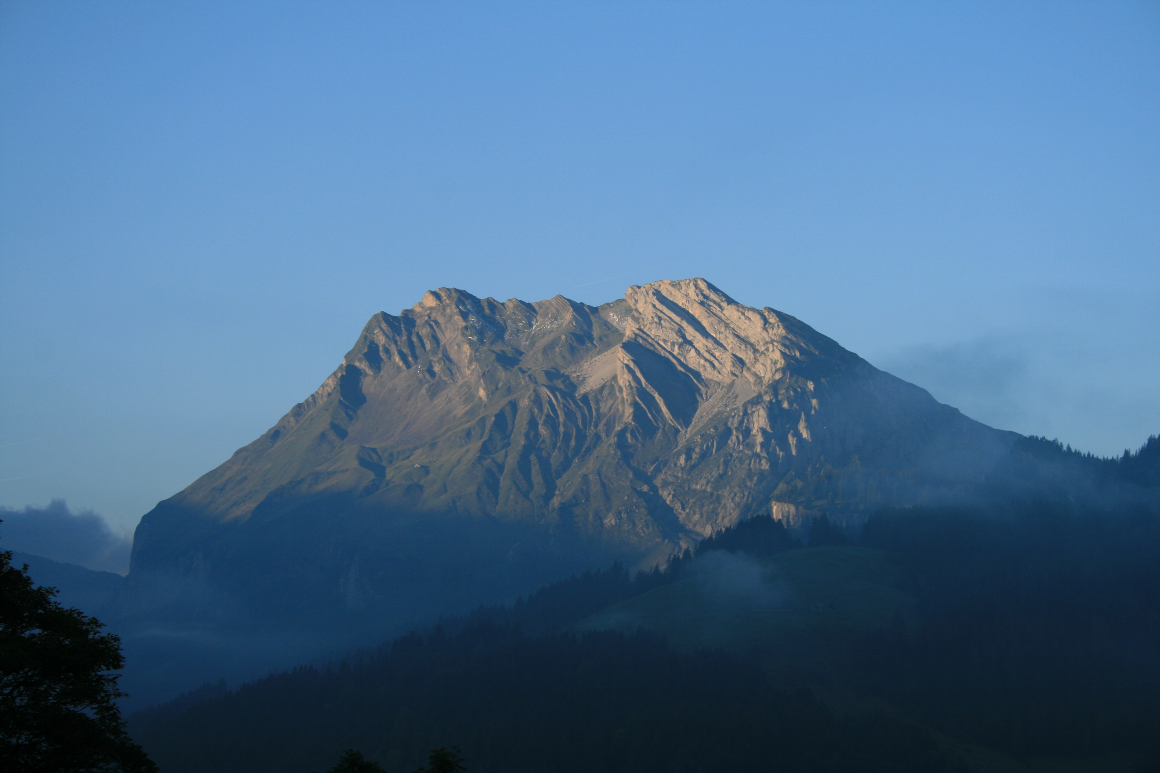 Blick von Innerthal SZ auf den Fluebrig in der Morgensonne, Schweiz